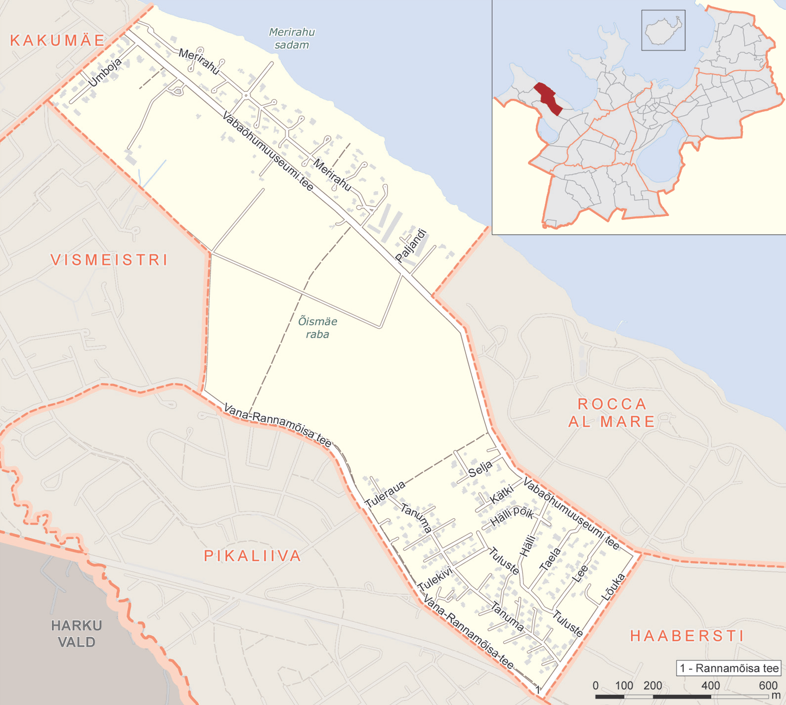 Õismäe asumi kaart